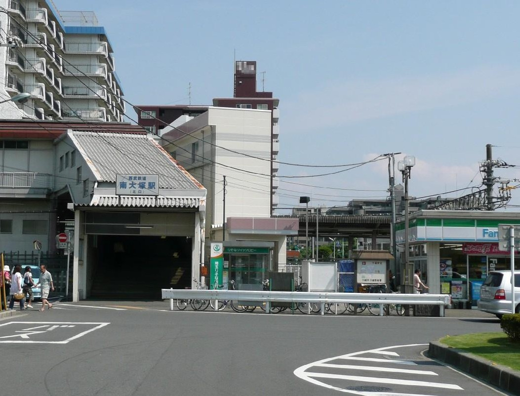 南大塚駅北口